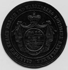 Sealing stamp Title: Graeflich Erbach-Erbach und Wartenberg-Rothische Rentkammer Description: Trauermarke, schwarz, geprägt Place: Erbach size: 4 cm